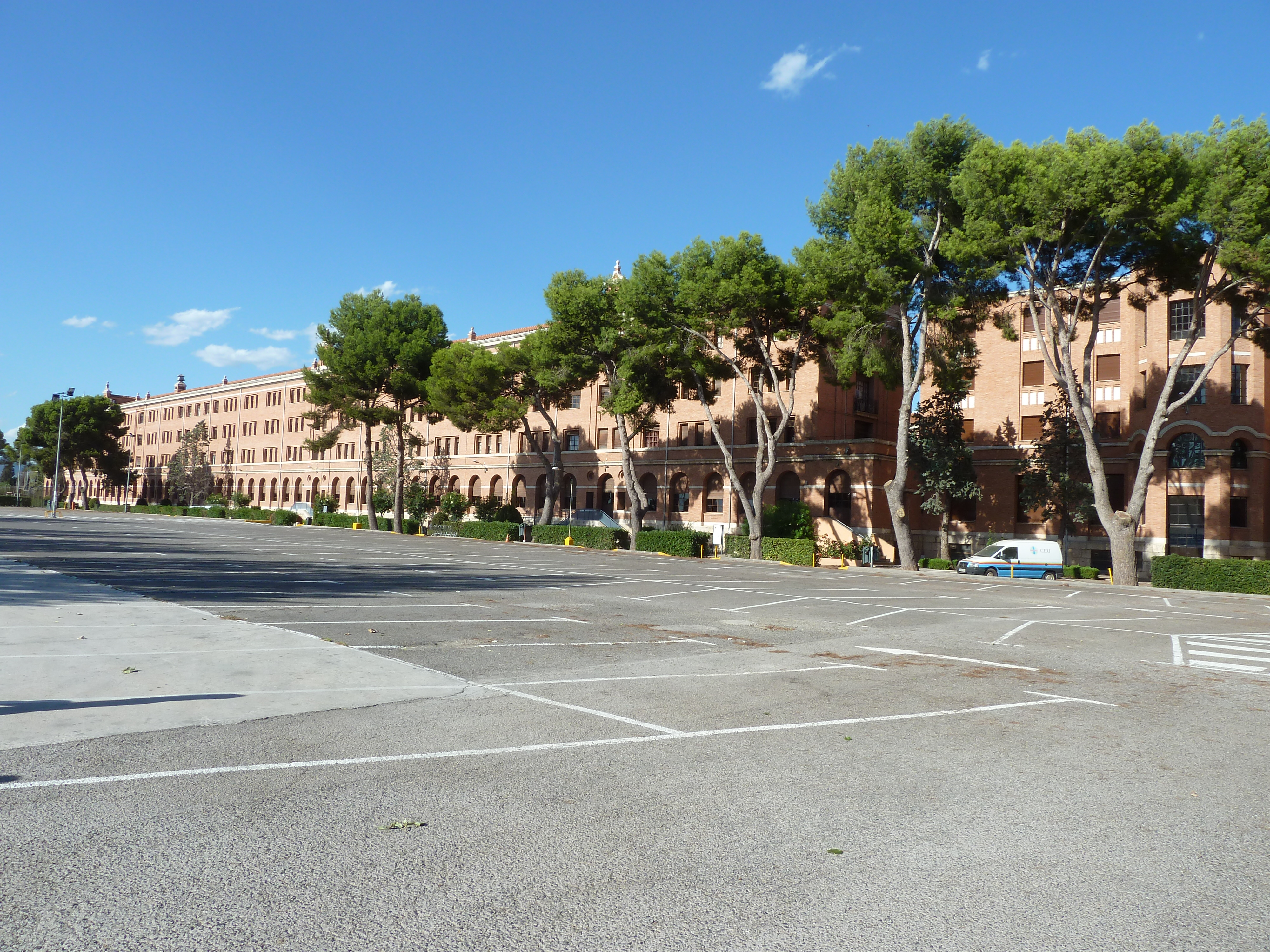 Pavelló del Seminari Metropolità de València. Montcada